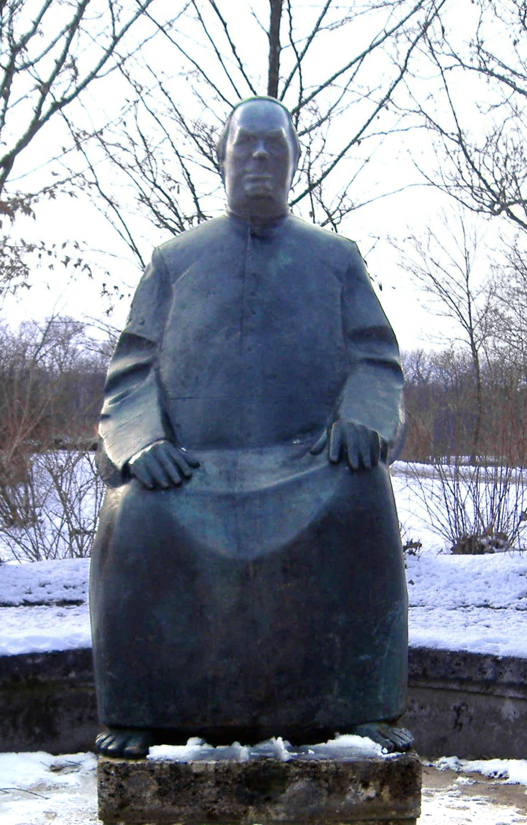 Künstler: Nida-Rümelin